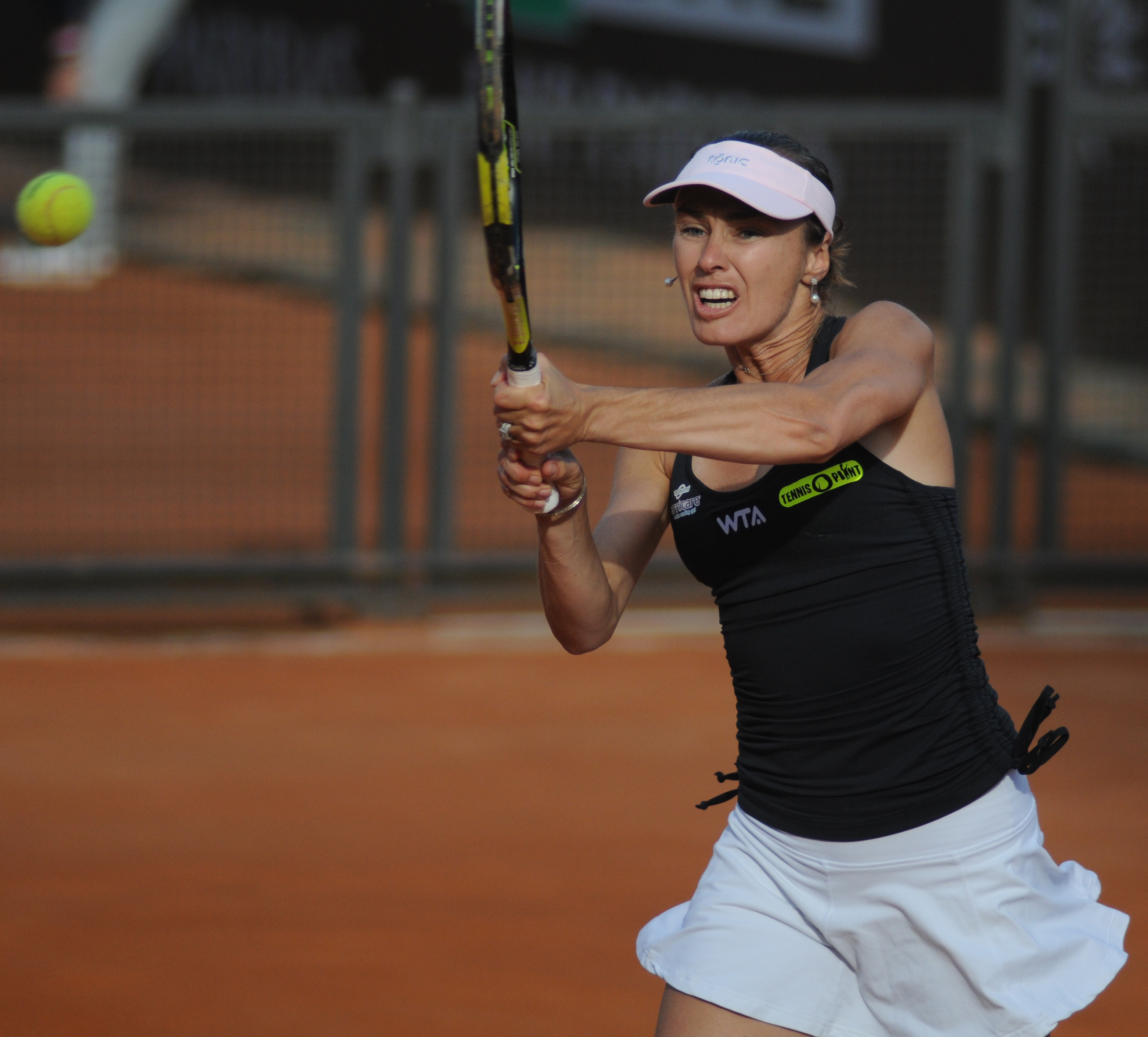 Martina Hingis at the 2014 Internazionali BNL d'Italia